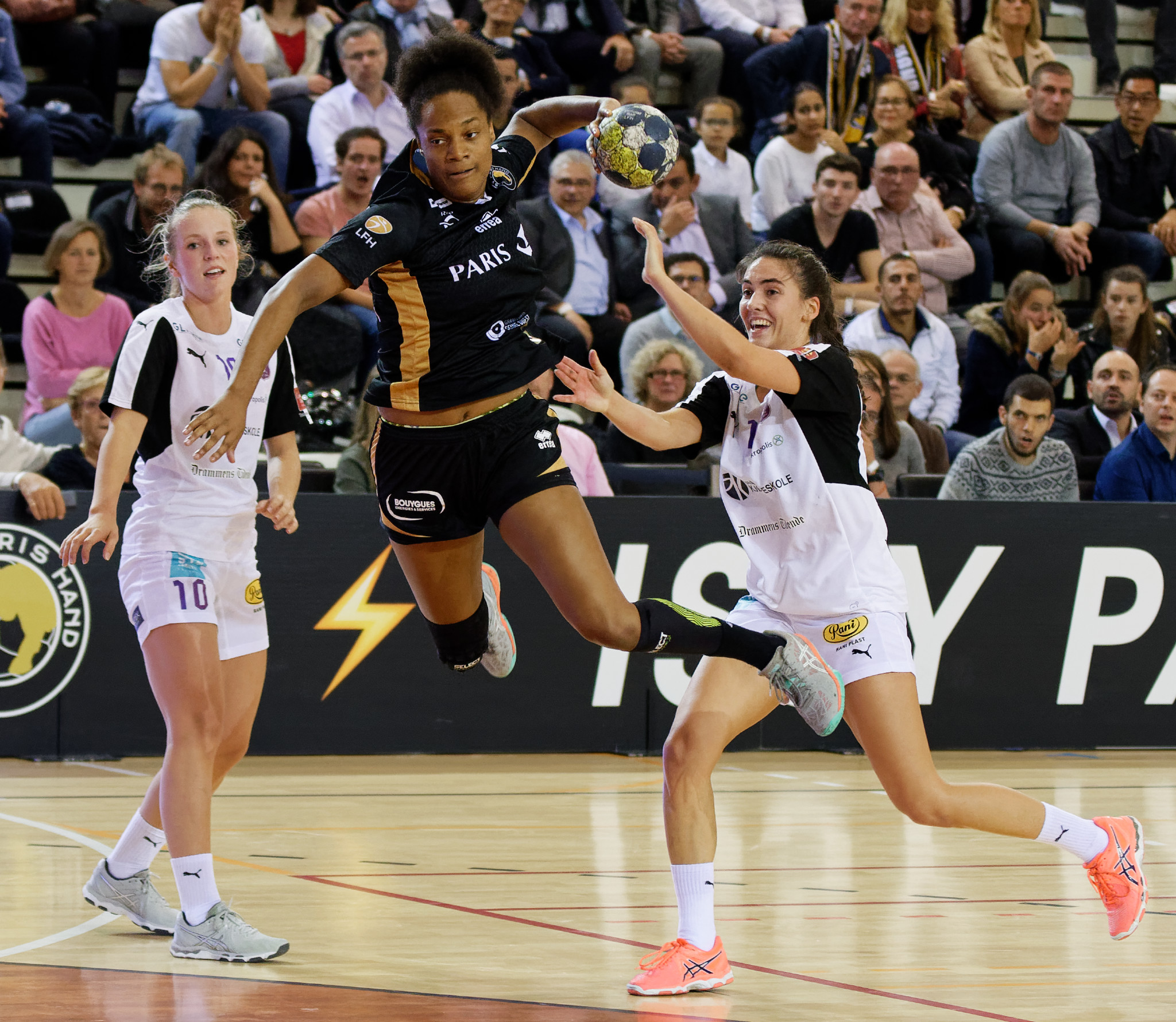 Match de coupe EHF entre Issy Paris Hand et les norvégiennes de Glassverket. A Issy Les Moulineaux, le 20 octobre 2017.